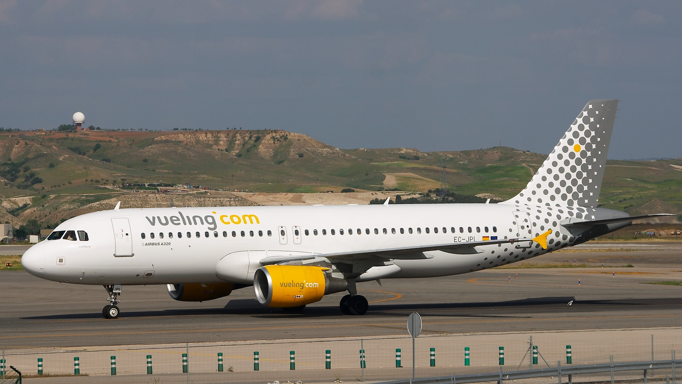 Airbus A320-214 de Vueling dirigiéndose hacia la T4. Aeropuerto de Madrid Barajas.